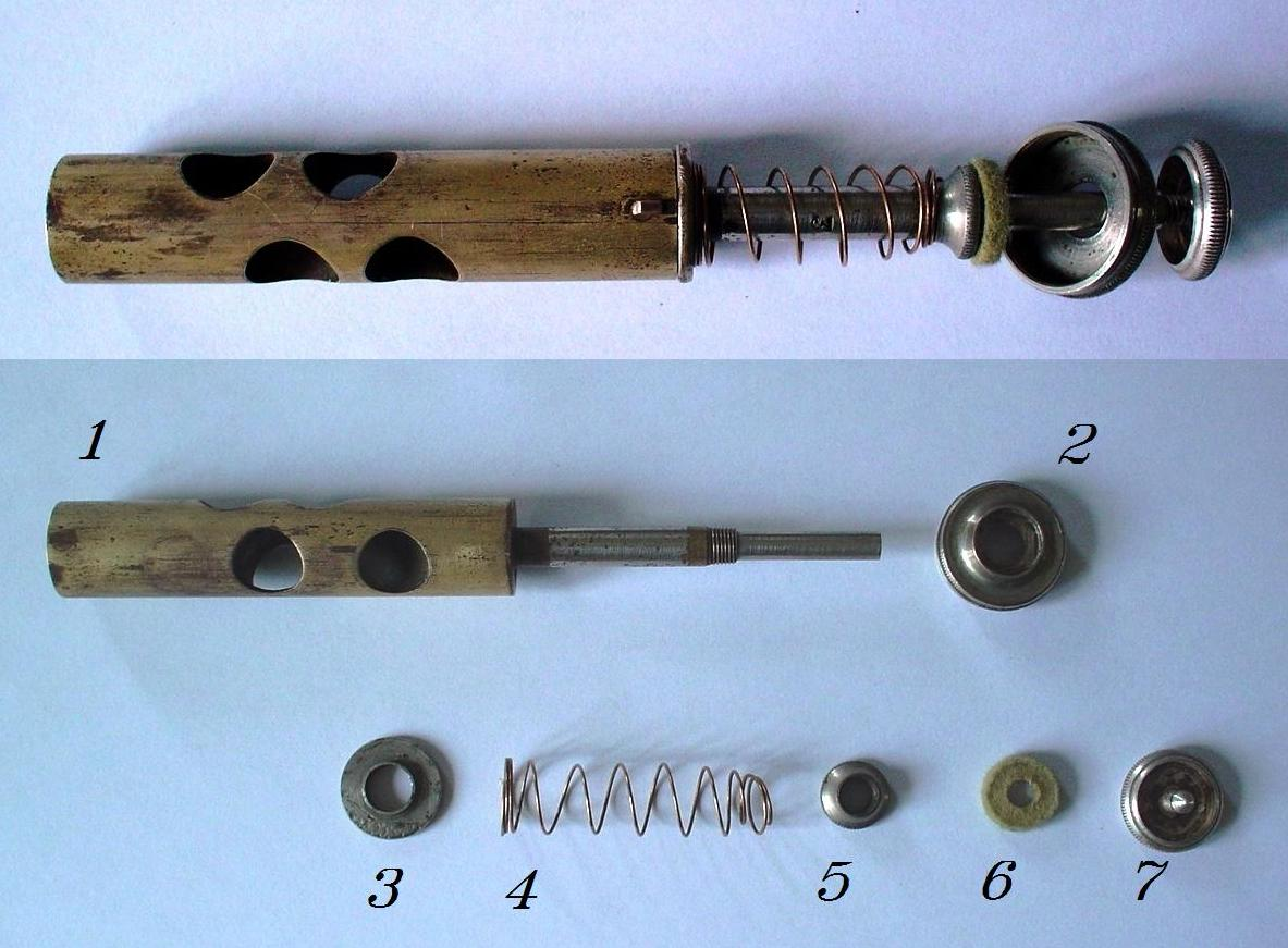 mecanisme du piston des cuivres